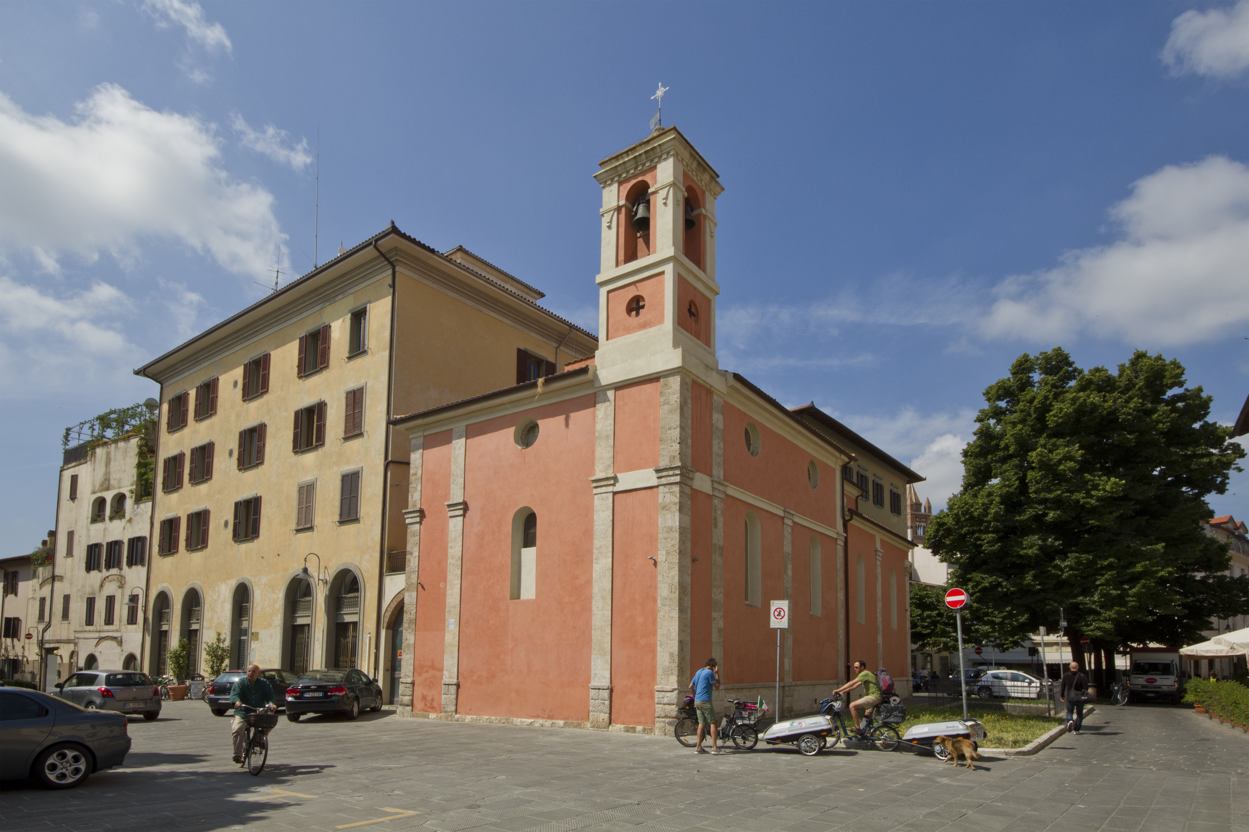 Chiesa della Misericordia, Grosseto, Tuscany, Italy